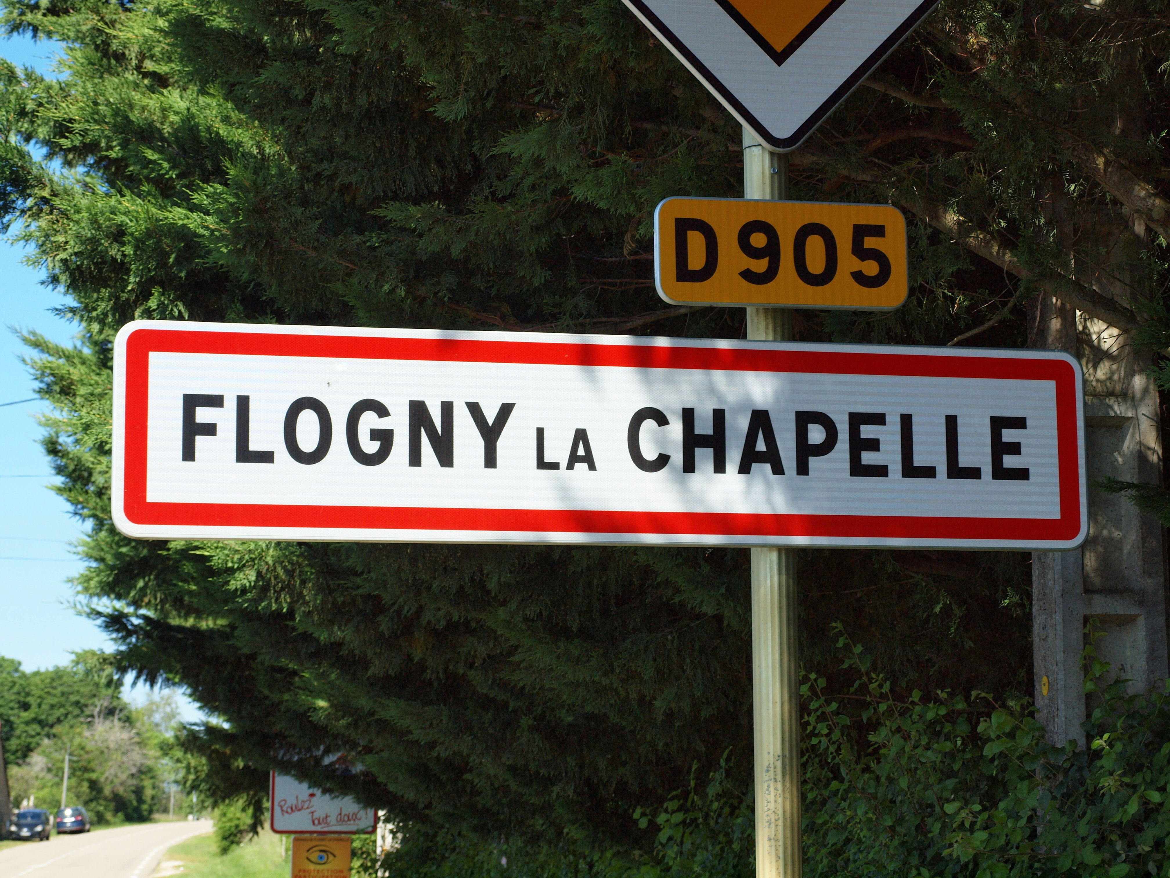 Flogny-la-Chapelle (Yonne, France) ; panneau de limite d'agglomération